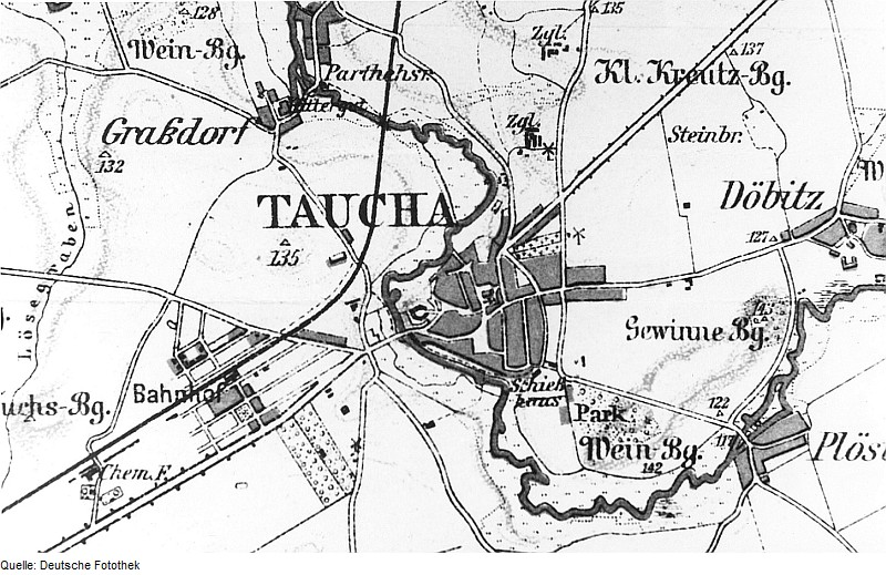 Original image description from the Deutsche Fotothek Taucha. Stadt und Umgebung, aus: Führer für Taucha und Umgebung, 1906